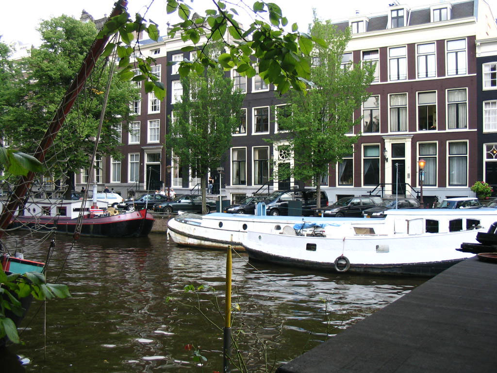 Foto is gemaakt door